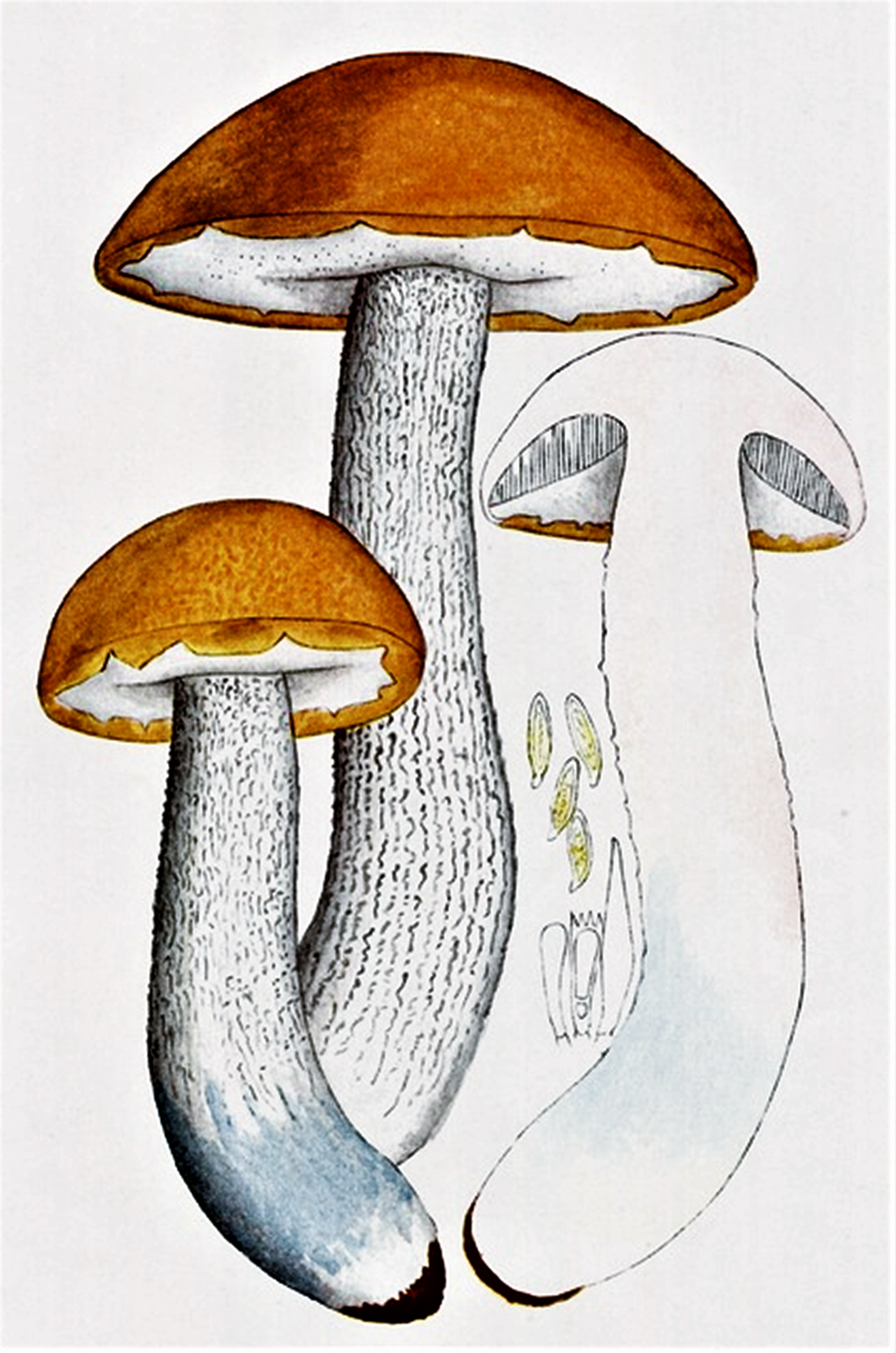 Giacomo Bresadola: Boletus rufus Schaeff. (1763), heute Leccinum aurantiacum (Bull., 1791) Gray (1821)